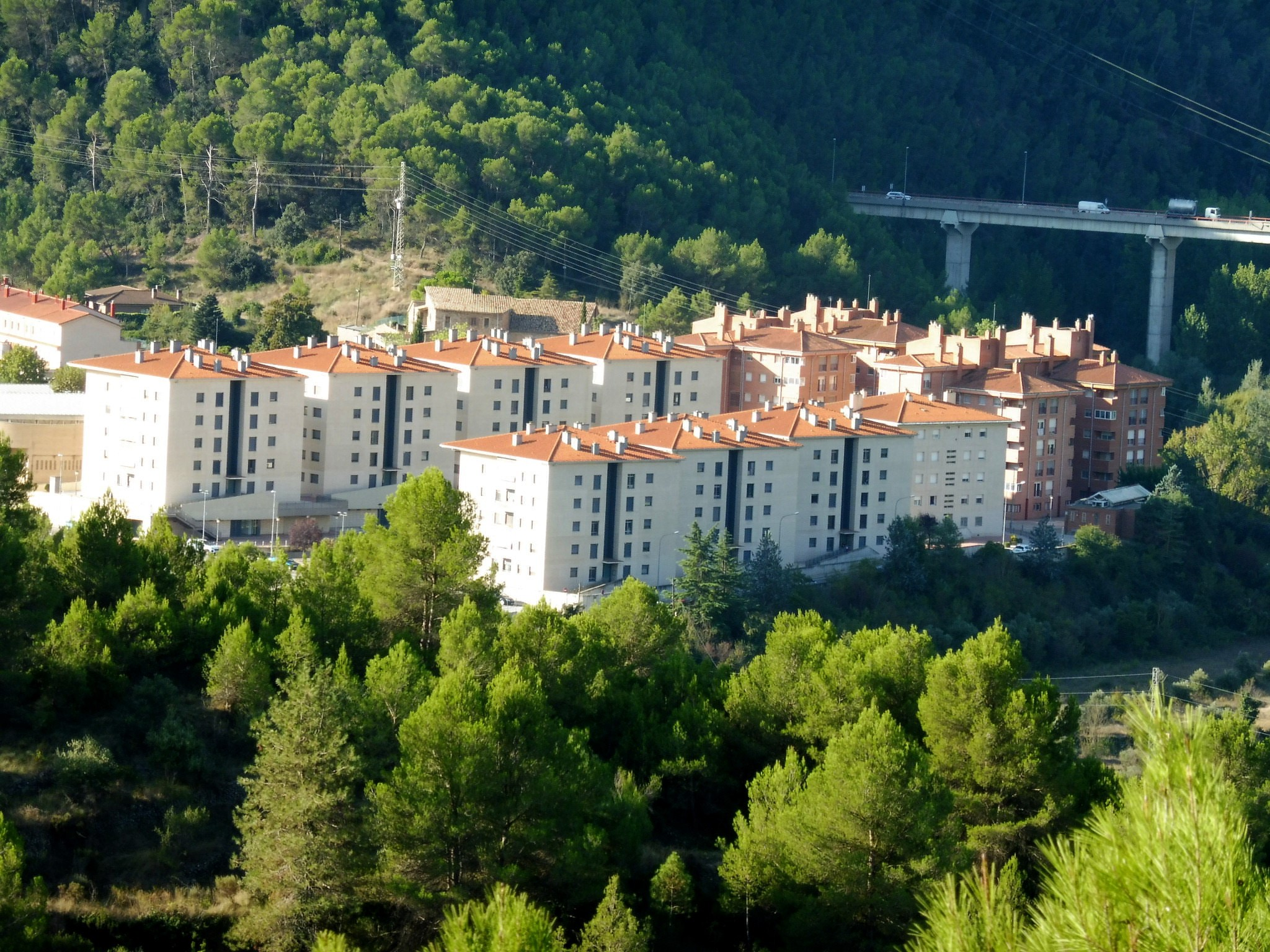 Barri de Salipota (Súria): nucli primigeni